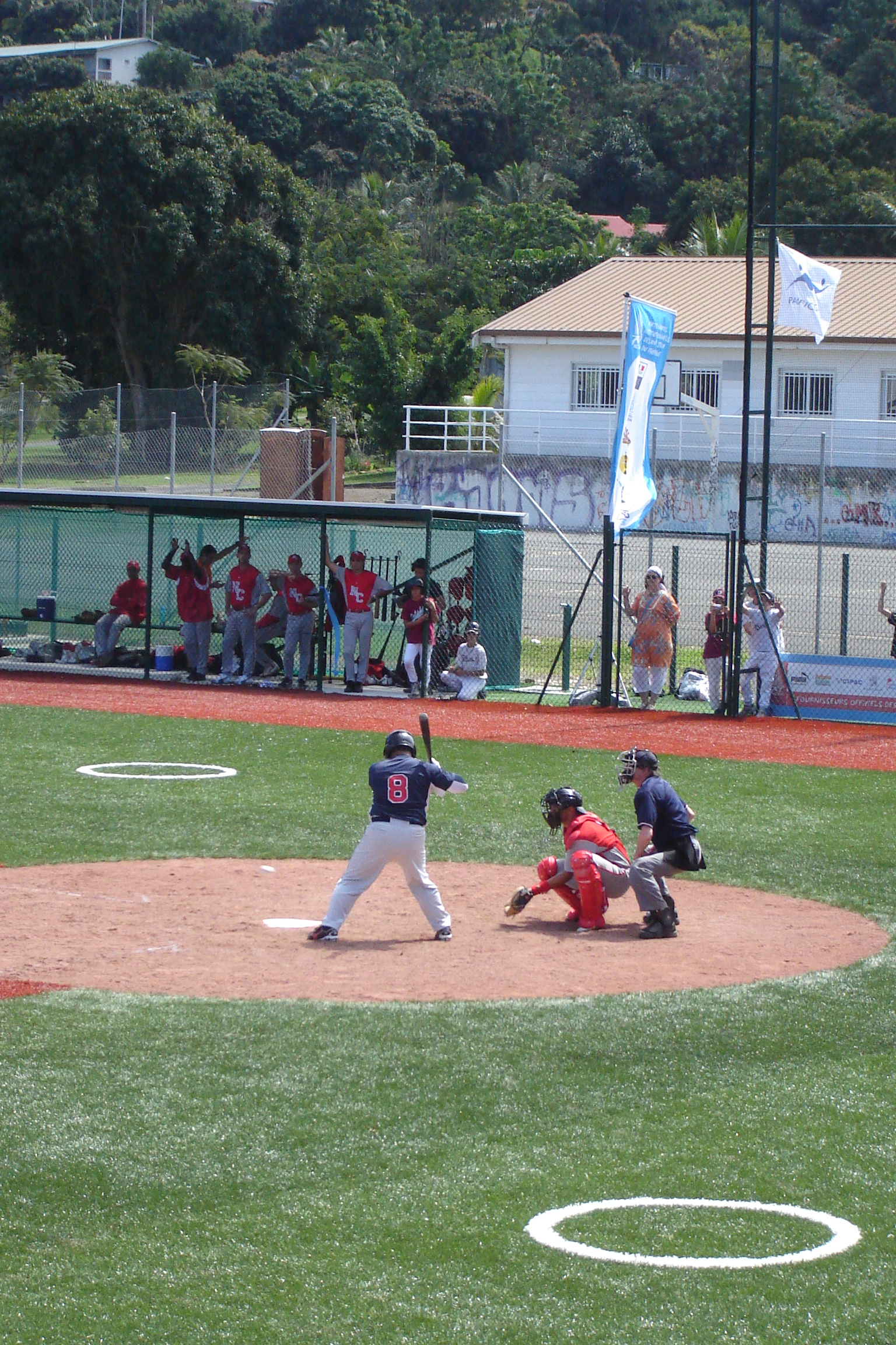 Match de baseball opposant la Nouvelle-Calédonie à Guam lors des Jeux du Pacifique 2011